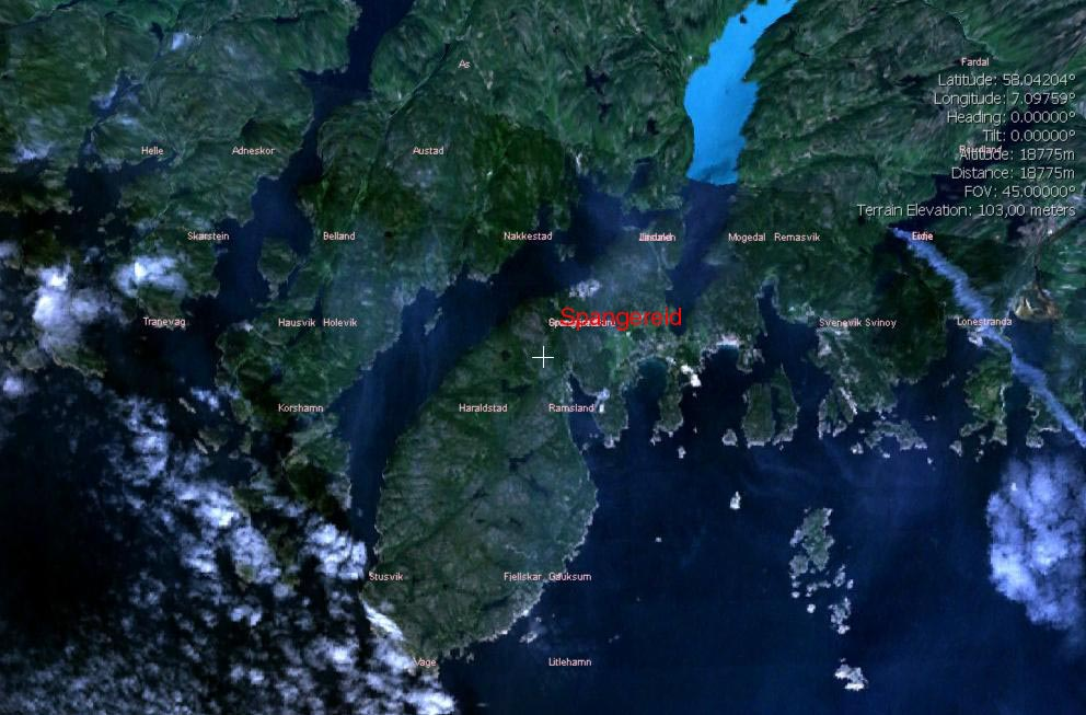 Satelittfoto over Spangereid